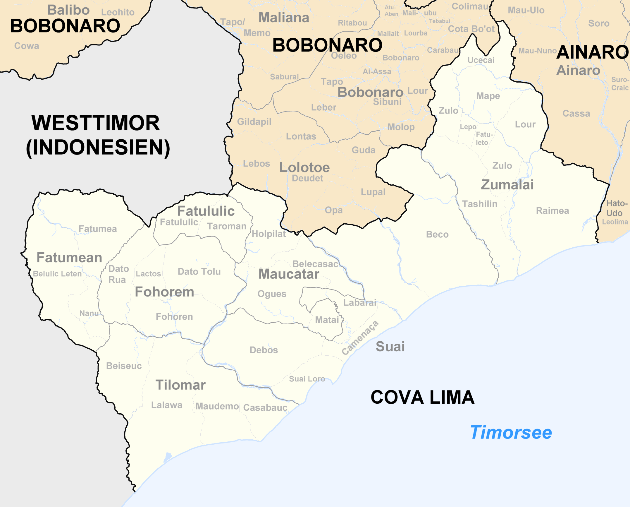 Sucos des Distrikts Cova Lima/Osttimor nach der Neustrukturierung 2004